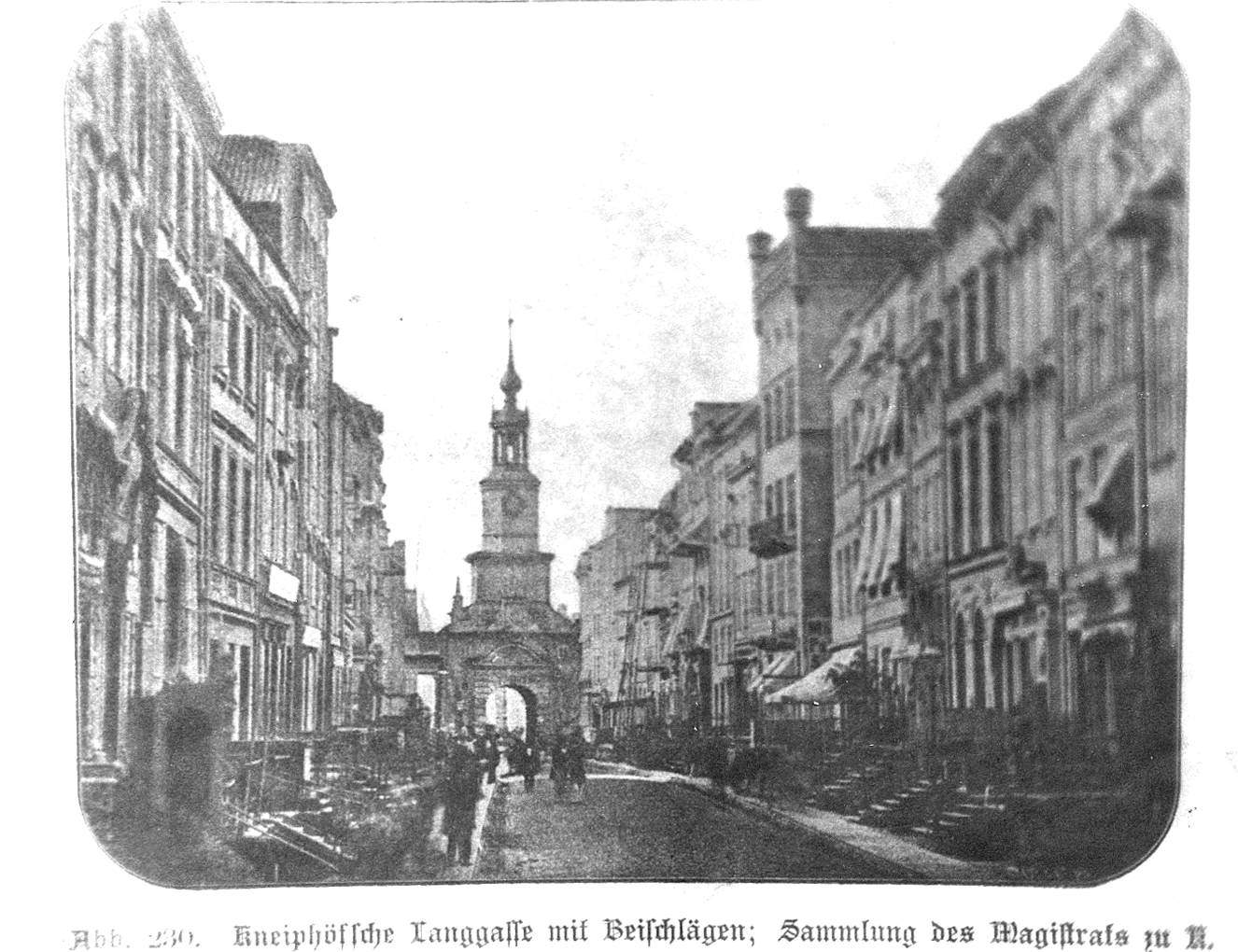 Достопримечательности города Кёнигсберг (Калининградская область РФ)